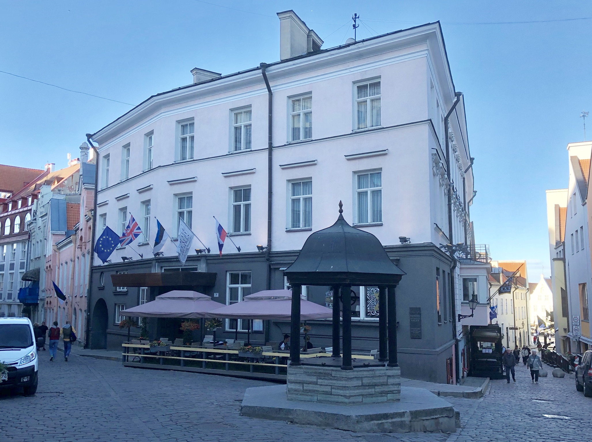 Hotel St. Petersburg in der Raderstraße